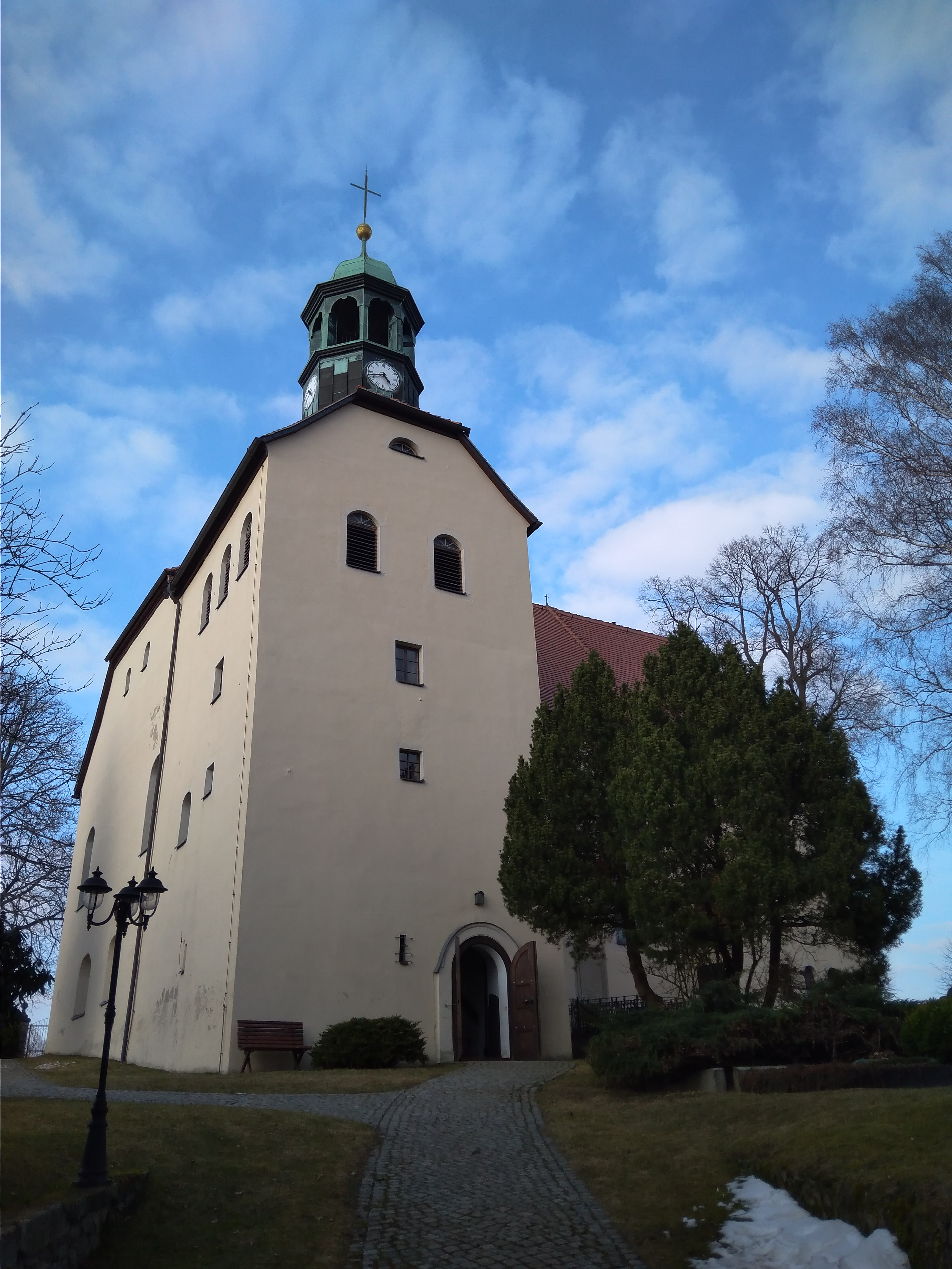 Dorfkirche in Oberottendorf, Stadt Neustadt in Sachsen